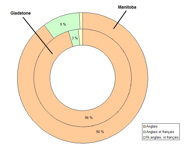 Maîtrise des langues officielles à Gladstone (Manitoba, Canada).